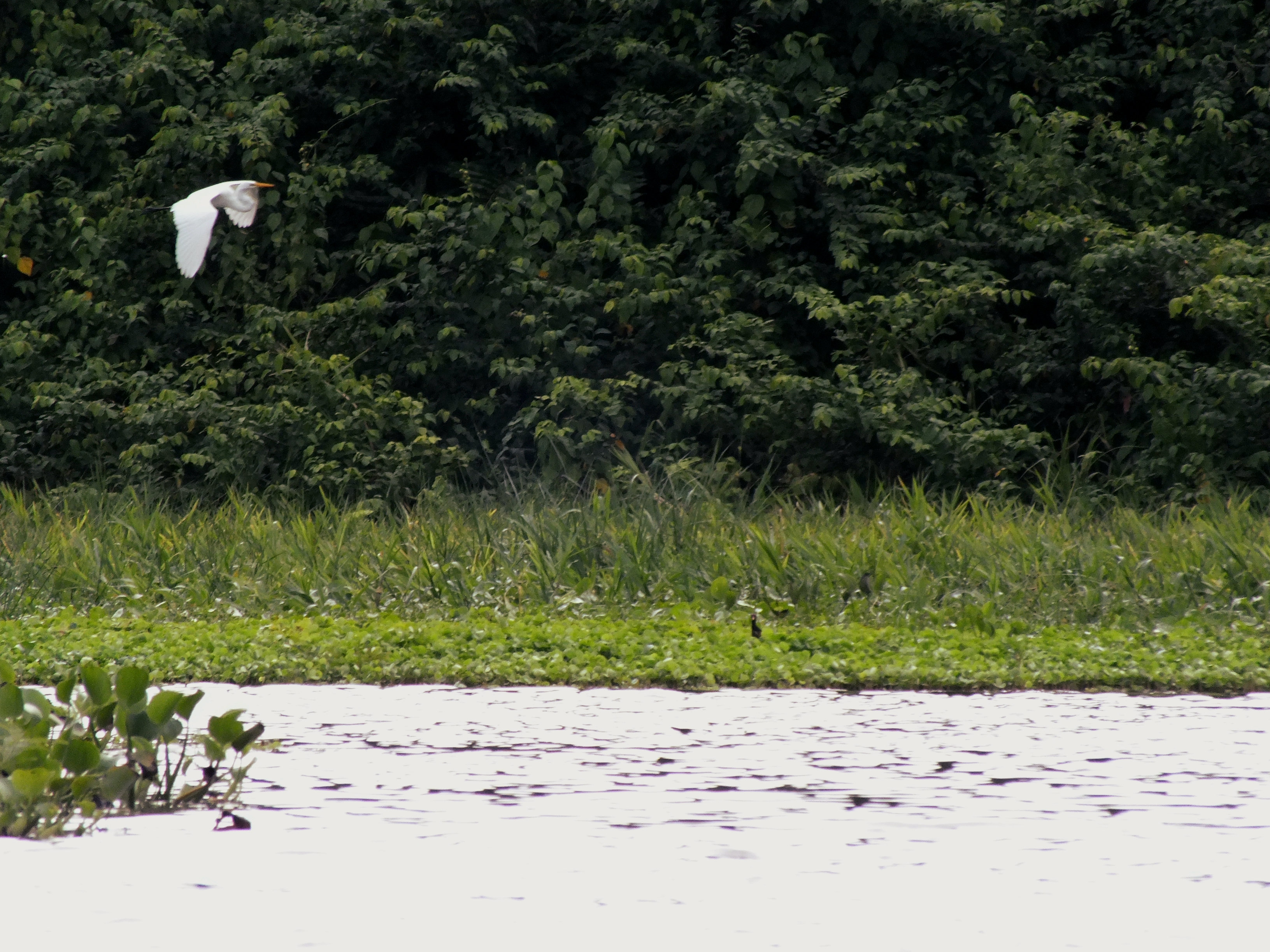 Foto tomada en el Parque Nacional Ciénagas del Catatumbo